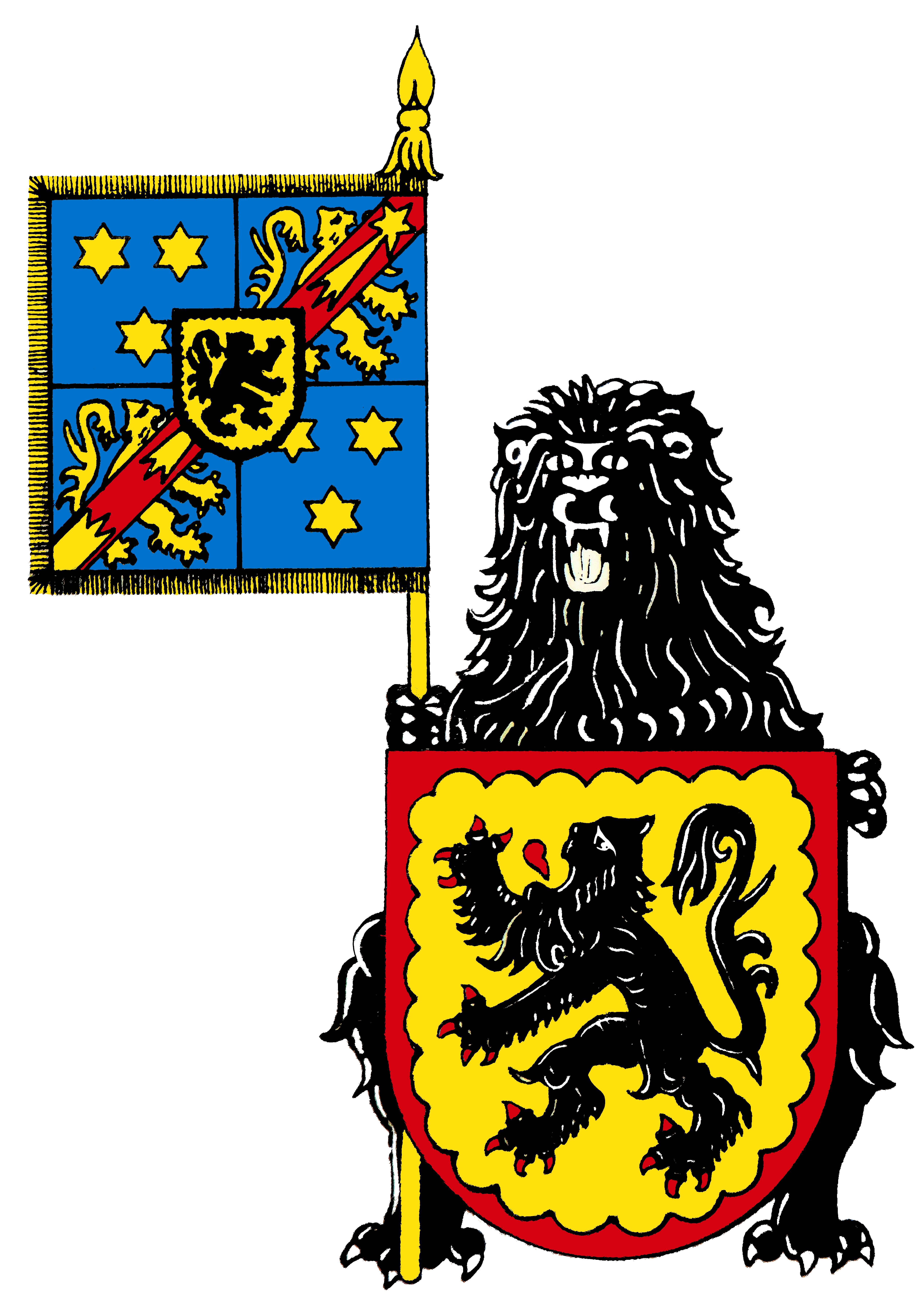 Origineel figuur van het Merelbeeks wapenschild, na de fusie in de jaren 70